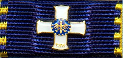 Bandschnalle des Ehrenzeich des Technischen Hilfswerks in Gold